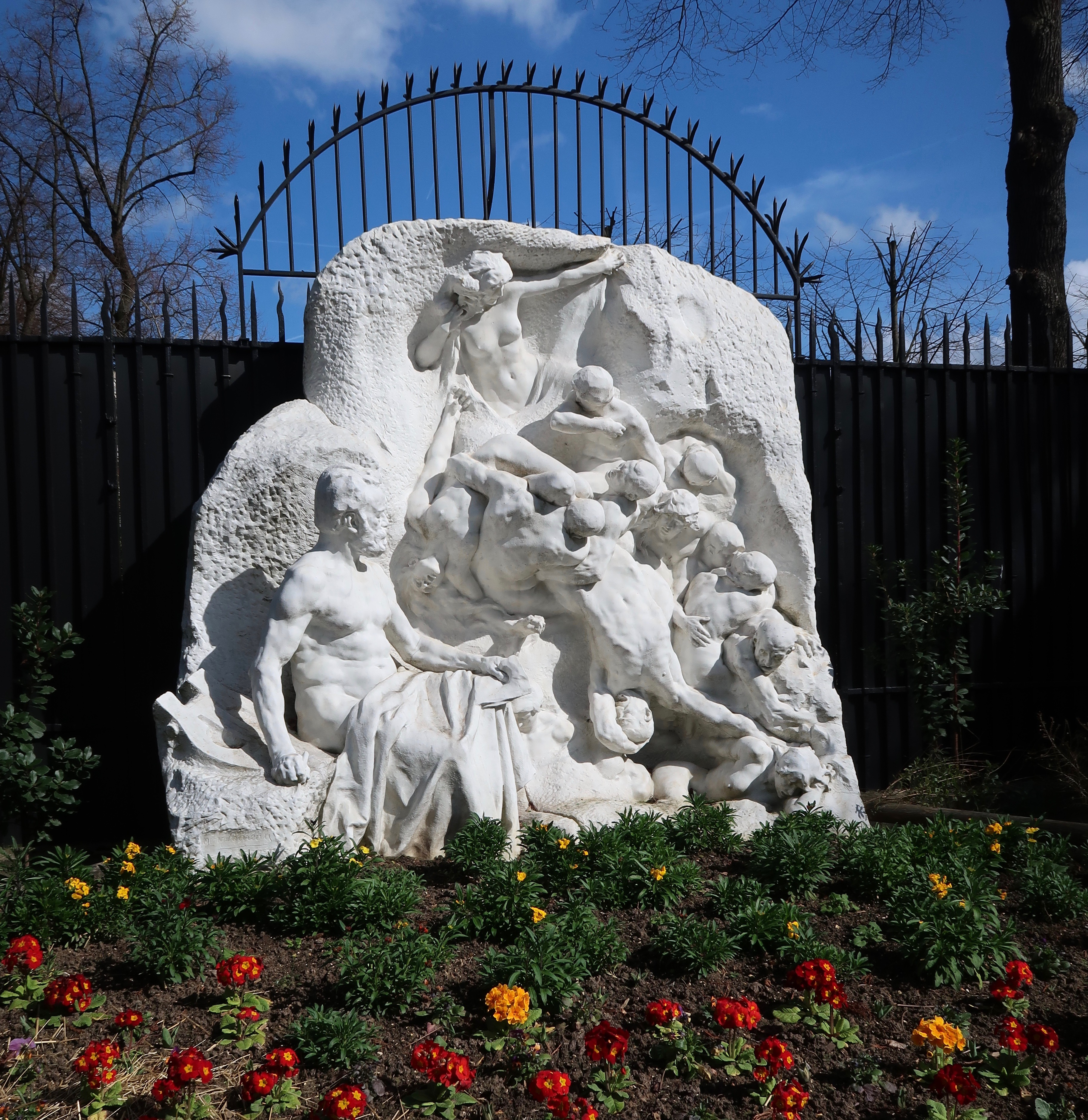 La Vision du poète (1902), haut relief en marbre de Georges Bareau (1866-1931), installé dans le jardin du Ranelagh (Paris, 16e) en 1985. Le poète est représenté sous les traits de Victor Hugo.